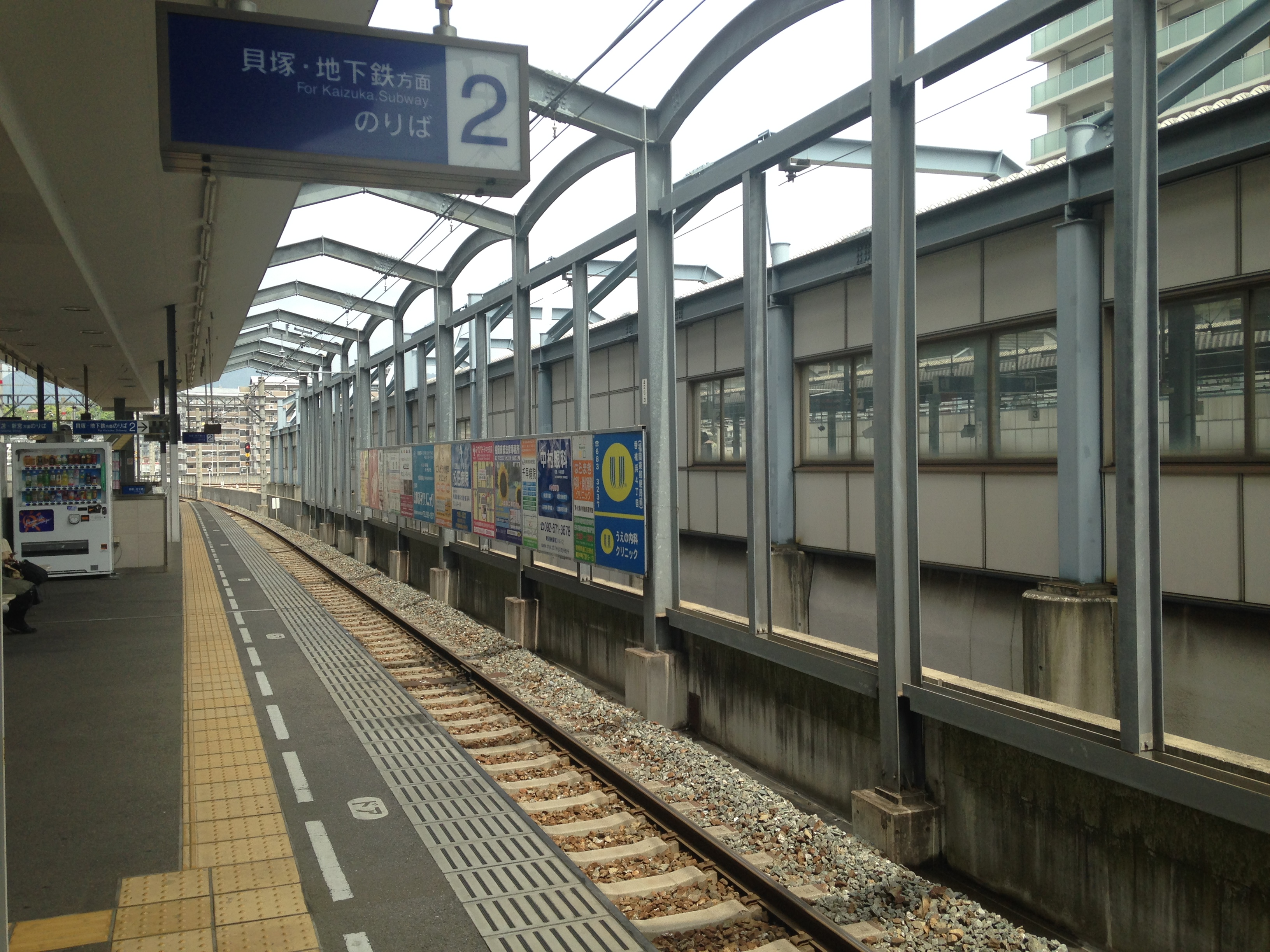 西鉄千早駅ホーム(奥は香椎宮前方面)